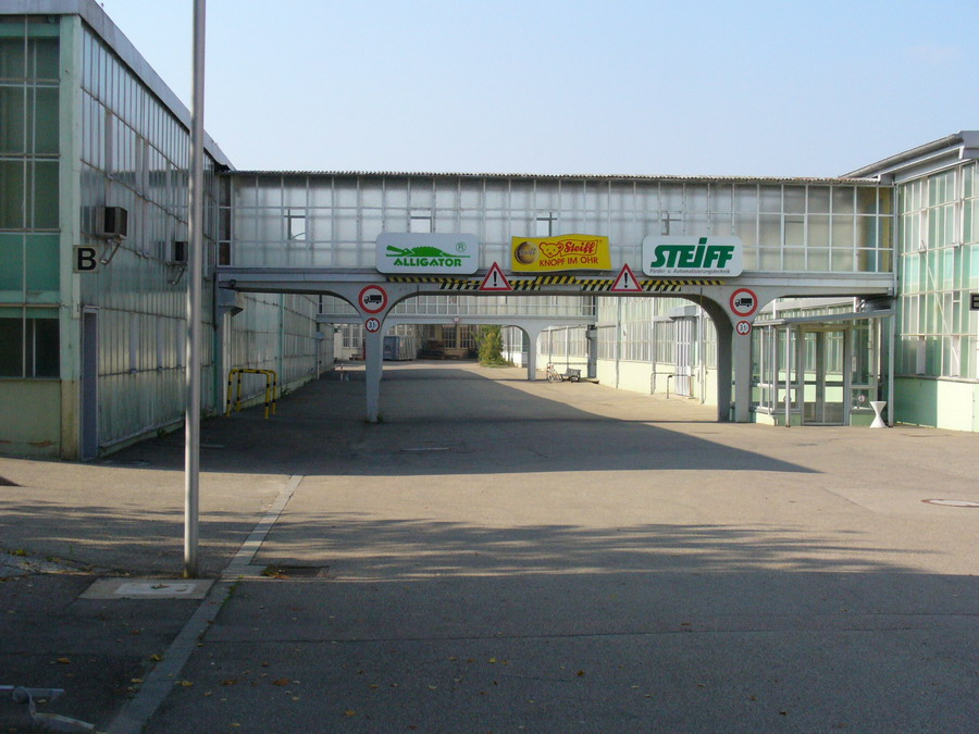 Giengen - Steiff-Fabrikgebaeude